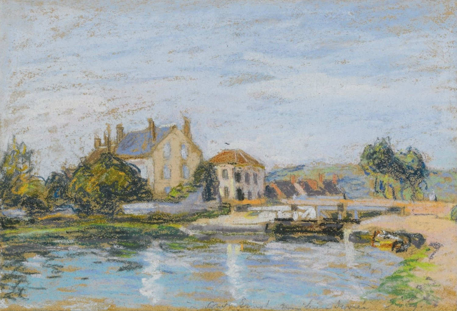 L'écluse n° 12 de la Gazonne, sur la commune d'Ouzouer-sur-Trézée (Loiret), jouxte l'étang de la Gazonne sur la rive Ouest de l'étang. Ces maisons sont donc en rive ouest du canal, vue vers le nord-ouest depuis le "côté Loire" de l'écluse (depuis la berge côté Est).